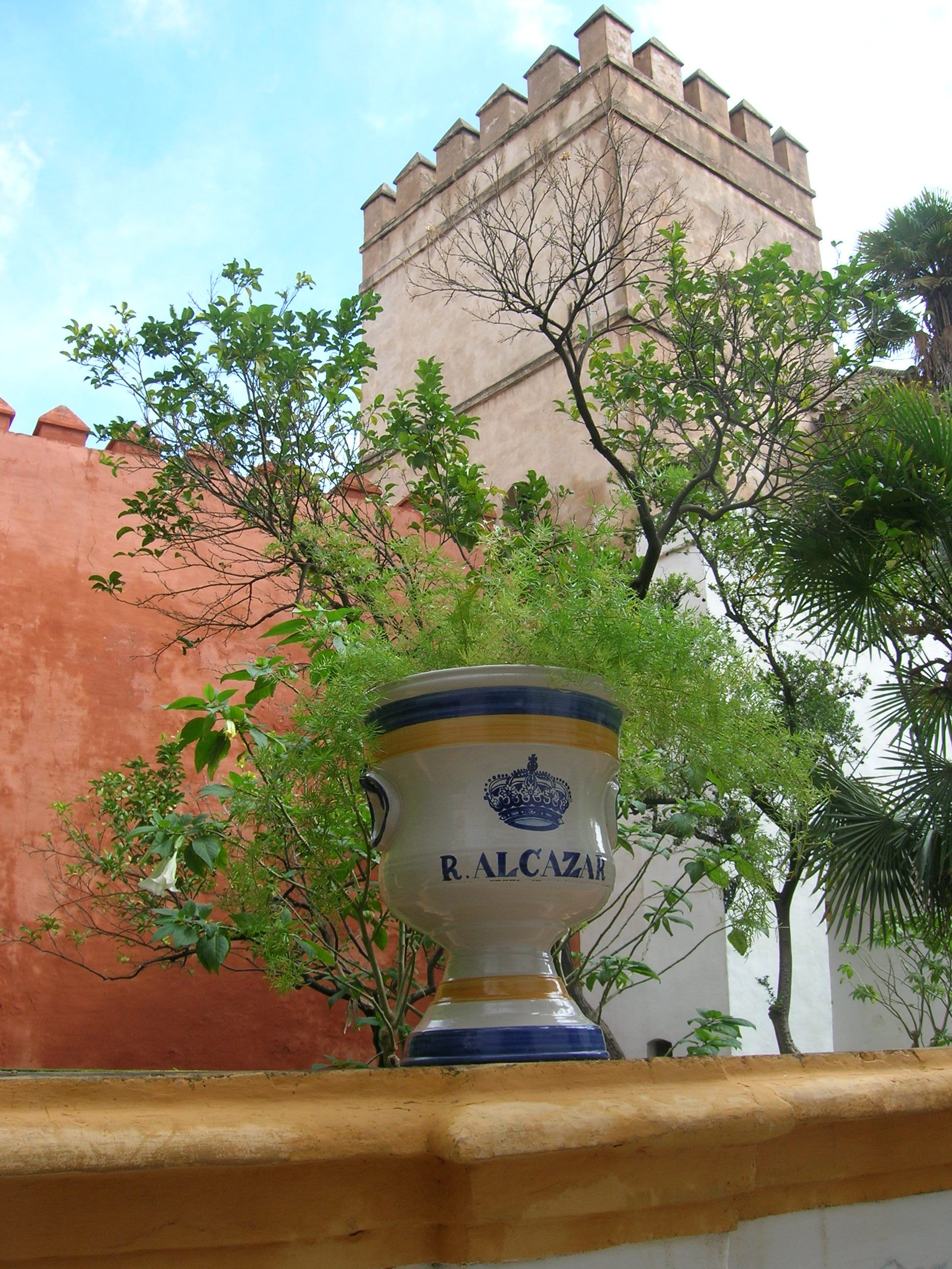 Reales Alcazares de Sevilla